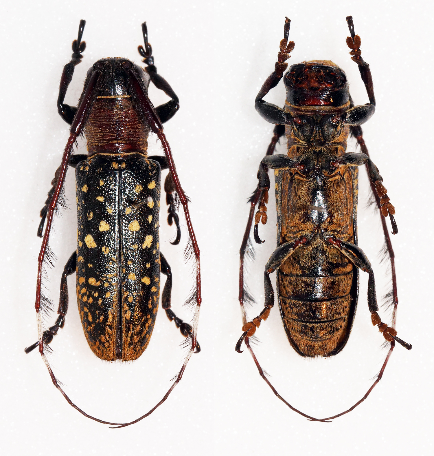 Vives,2005 Sex: Female Data: 05-2014 - Cabanglasan - Bukidnon - Mindanao - Philippines Size: 25.5mm